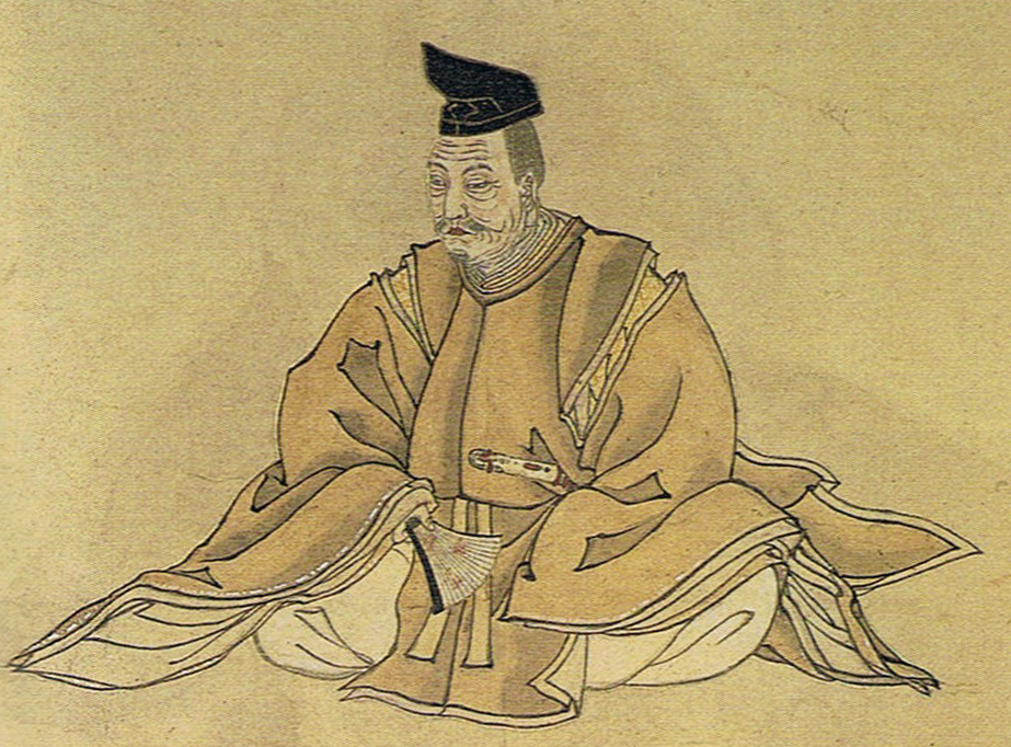 毛越寺 一山白王院 所蔵の「三衡画像」より、藤原清衡